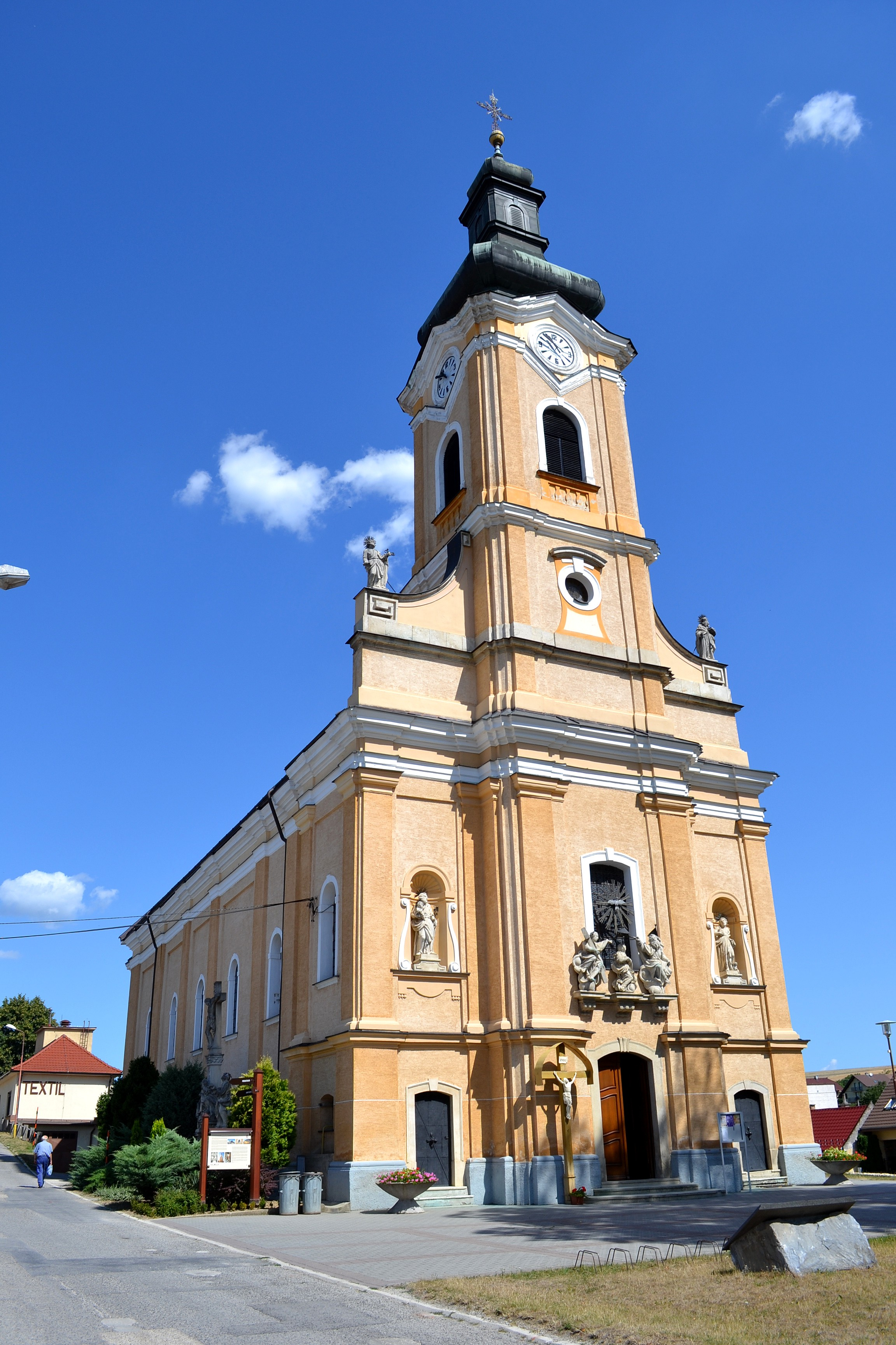 Chtelnica (okr. Piešťany), Kostol Najsvätejšej Trojice; celkový pohľad